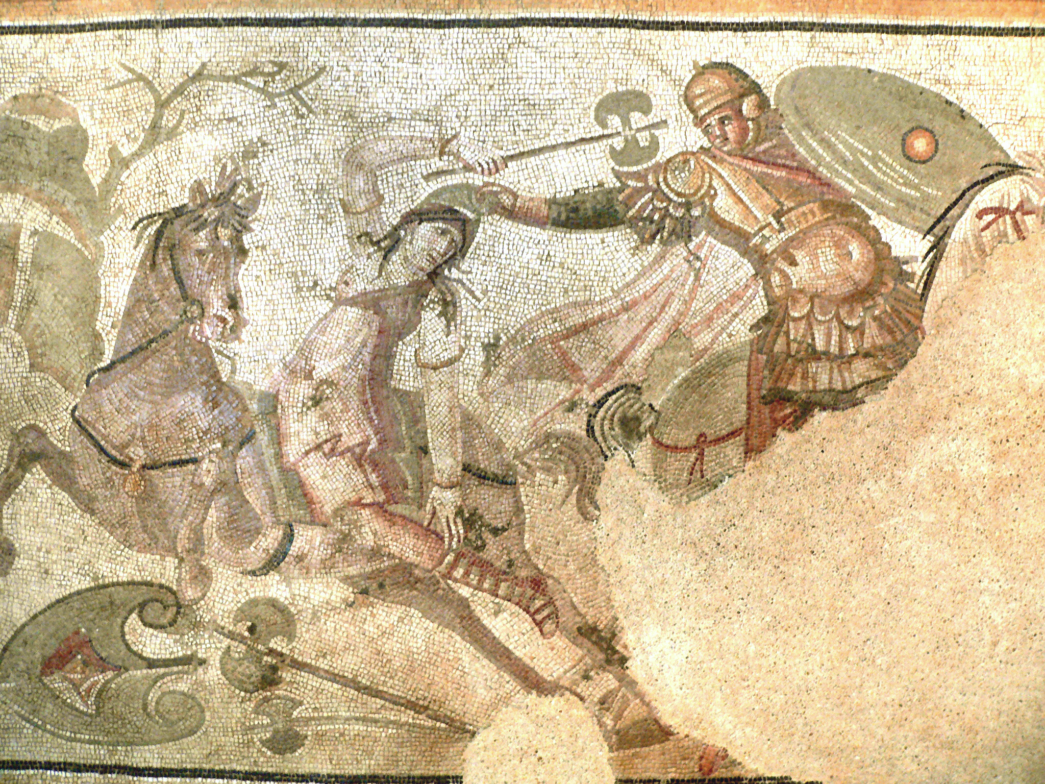 Amazonomachie, 2ème moitié du IV° s. ap. J.-C., Turquie, Daphné (faubourg d'Antioche sur l'Oronte, actuelle Antakya), fragment de mosaïque de pavement, marbre et calcaire.